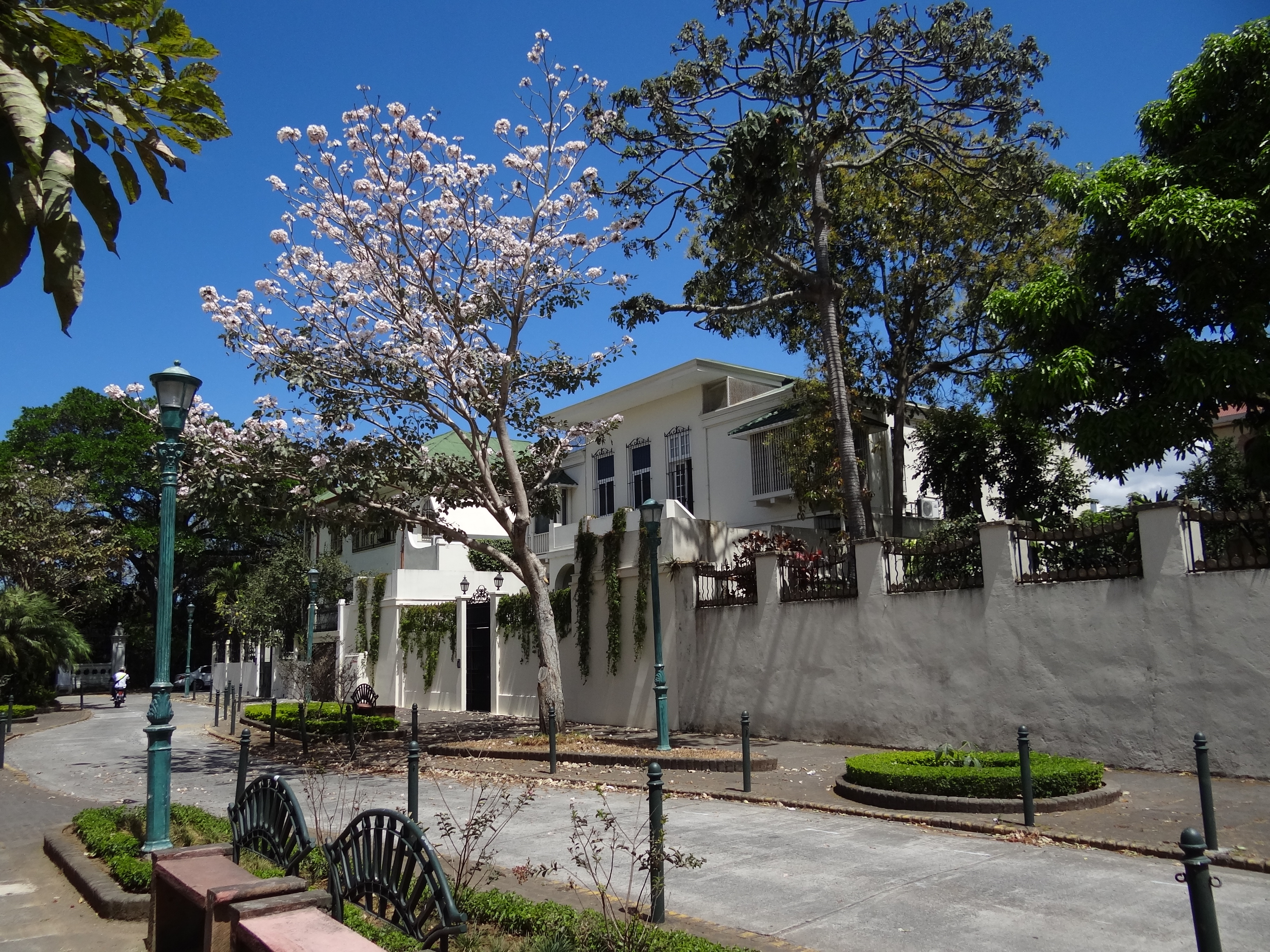 Calle 11 de la ciudad de San José, Costa Rica